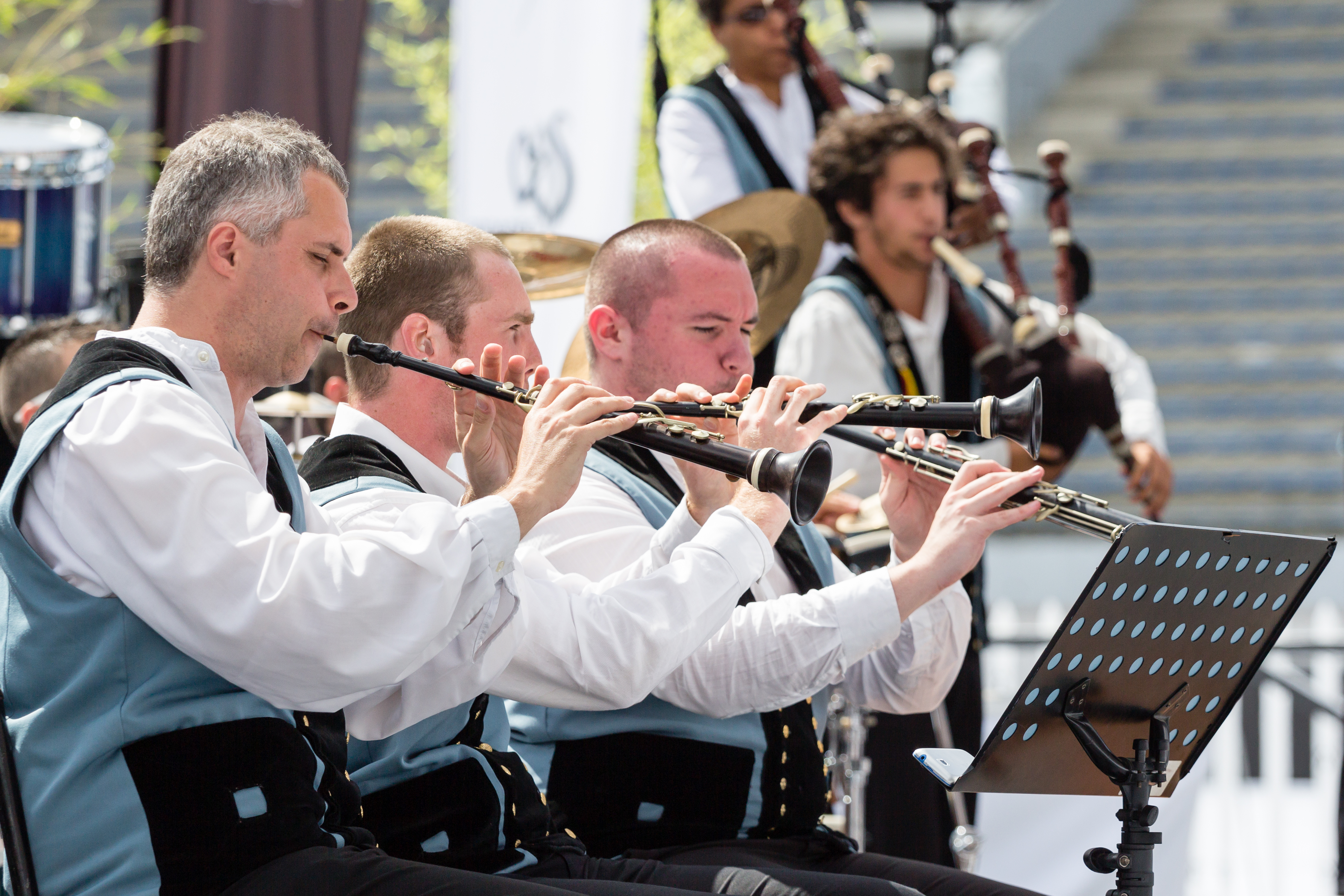 Le bagad Melinerion lors du championnat national des bagadoù (première catégorie) au FIL 2012.